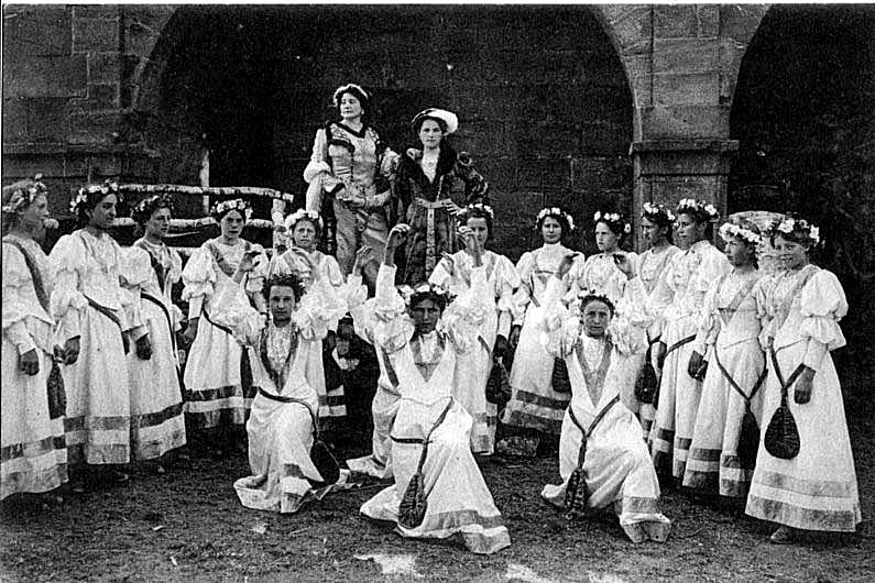 Barba